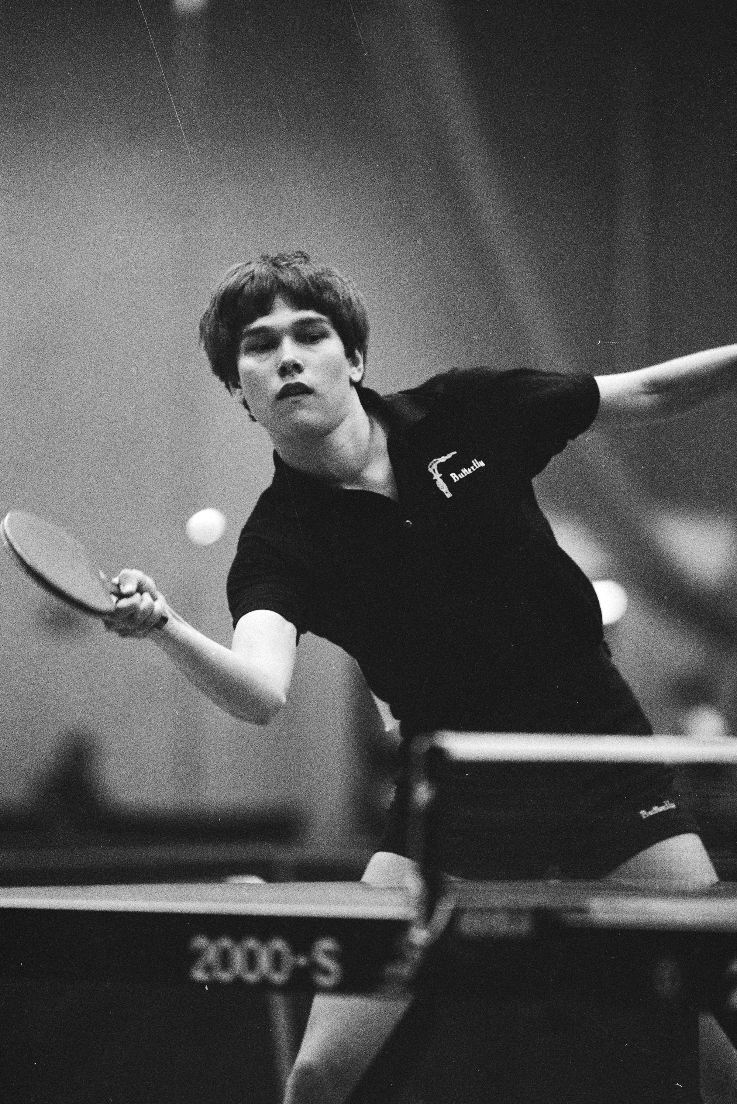 Collectie / Archief : Fotocollectie Anefo Reportage / Serie : Nederlands Kampioenschap Tafeltennis 1983 in Utrecht Beschrijving : Bettine Vriesekoop in actie Datum : 13 maart 1983 Locatie : Utrecht (prov), Utrecht (stad) Trefwoorden : sport, tafeltennis, wedstrijden Persoonsnaam : Vriesekoop, Bettine Fotograaf : Croes, Rob C. / Anefo Auteursrechthebbende : Nationaal Archief Materiaalsoort : Negatief (zwart/wit) Nummer archiefinventaris : bekijk toegang 2.24.01.05 Bestanddeelnummer : 932-5298